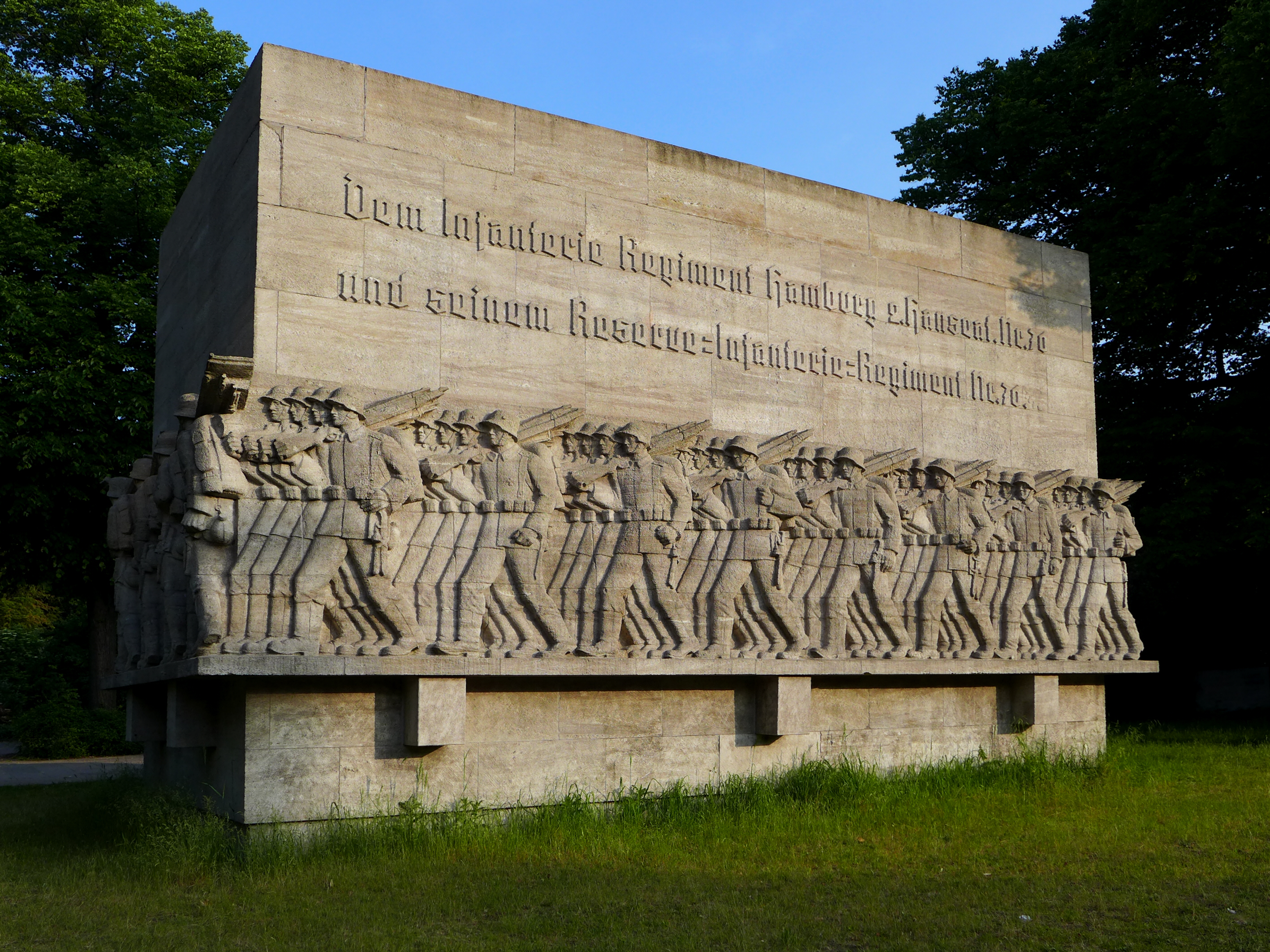 Soldatenehrenmal geschaffen von Richard Kuöhl am Dammtordamm, Hamburg. Gedenken an die Gefallenen des Infanterie-Regiment „Hamburg“ (2. Hanseatisches) Nr. 76. Die rückwärtige Längsseite des Ehrenmals trägt die Inschrift „Deutschland muss leben und wenn wir sterben müssen“ aus dem Gedicht „Soldatenabschied“ von Heinrich Lersch.